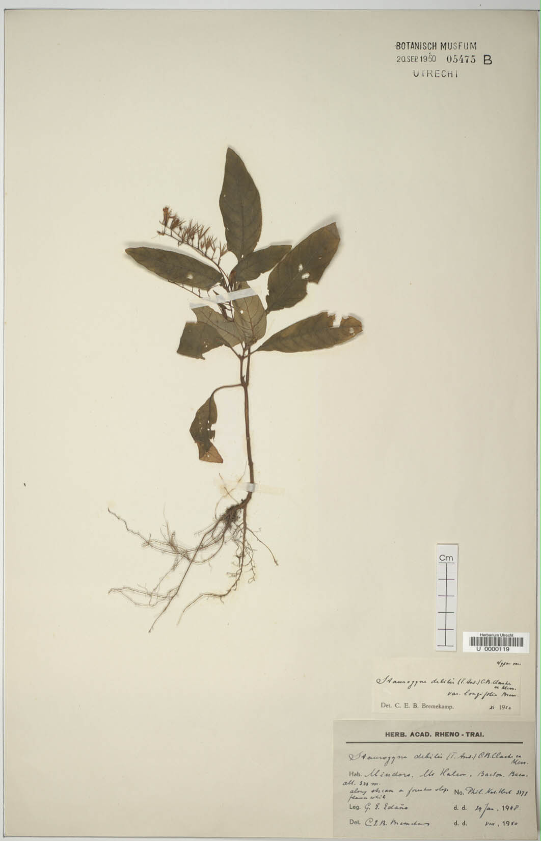 Staurogyne debilis v. longifolia